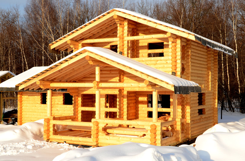 Деревянные дома.